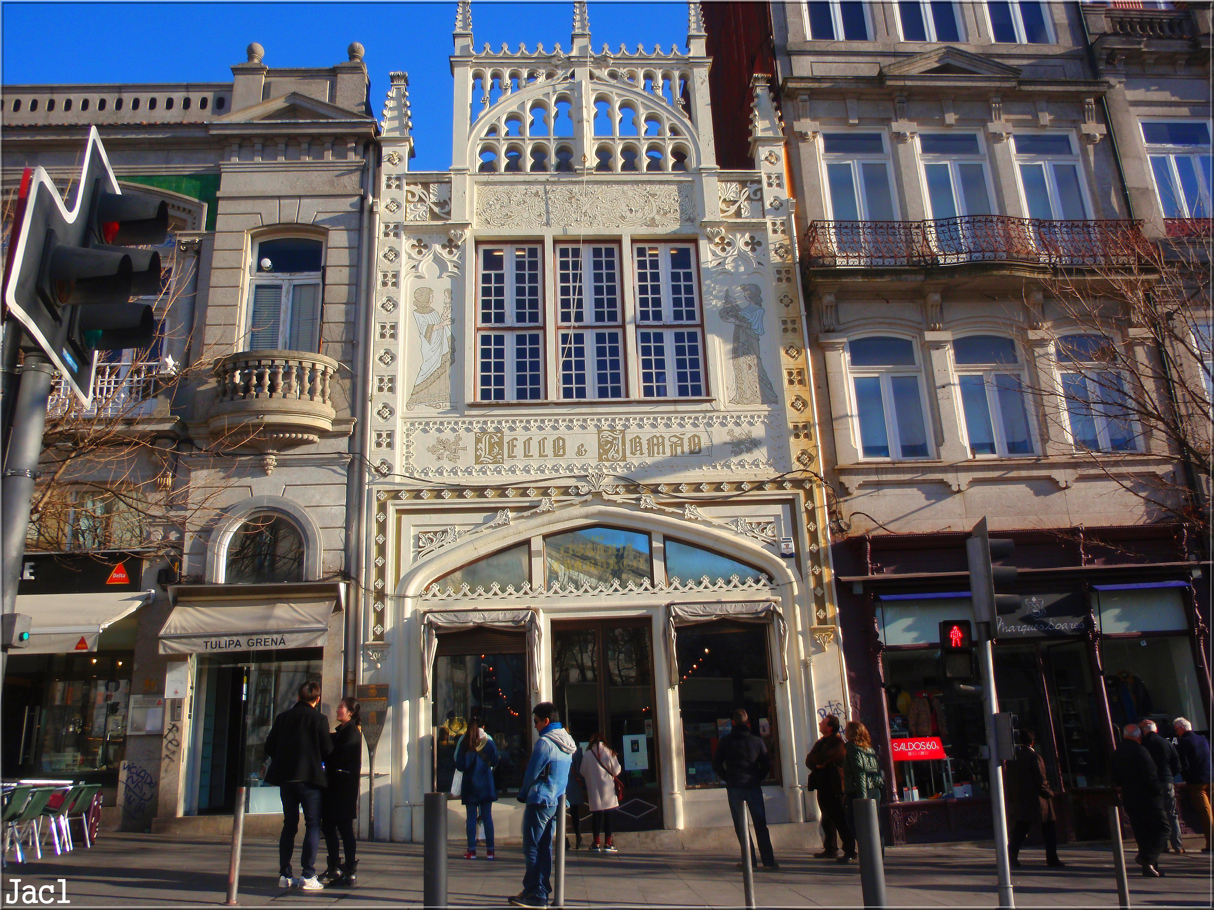 Oporto (Portugal)